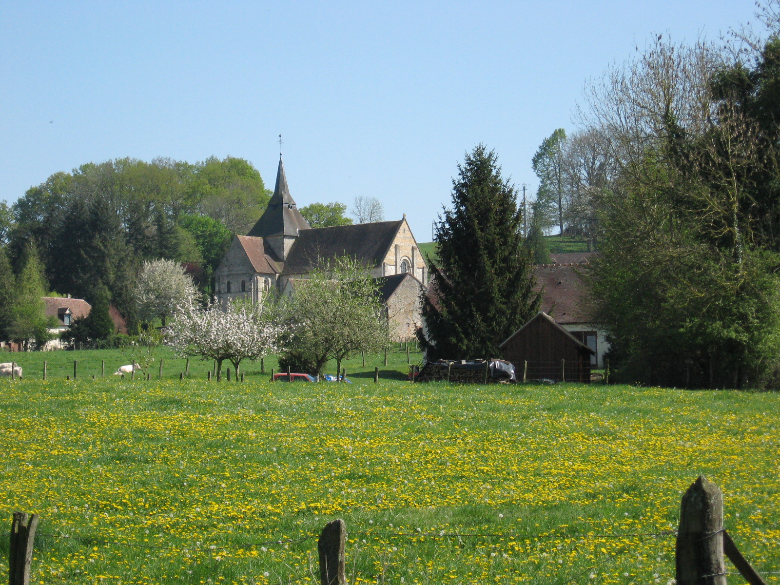 vue du nord ouest